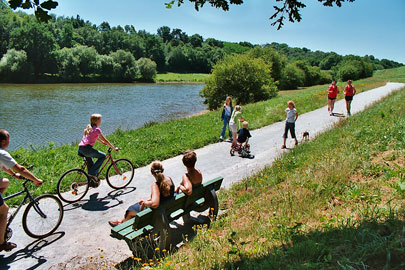 L'Oust, promeneurs et cyclotouristes à Guegon.